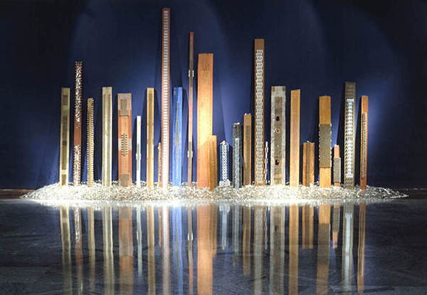 Raspadores de monedas› Caracas, 1996-97 24 maderas con monedas y símbolos Dimensiones variables Colecciones privadas Exposición Identidad